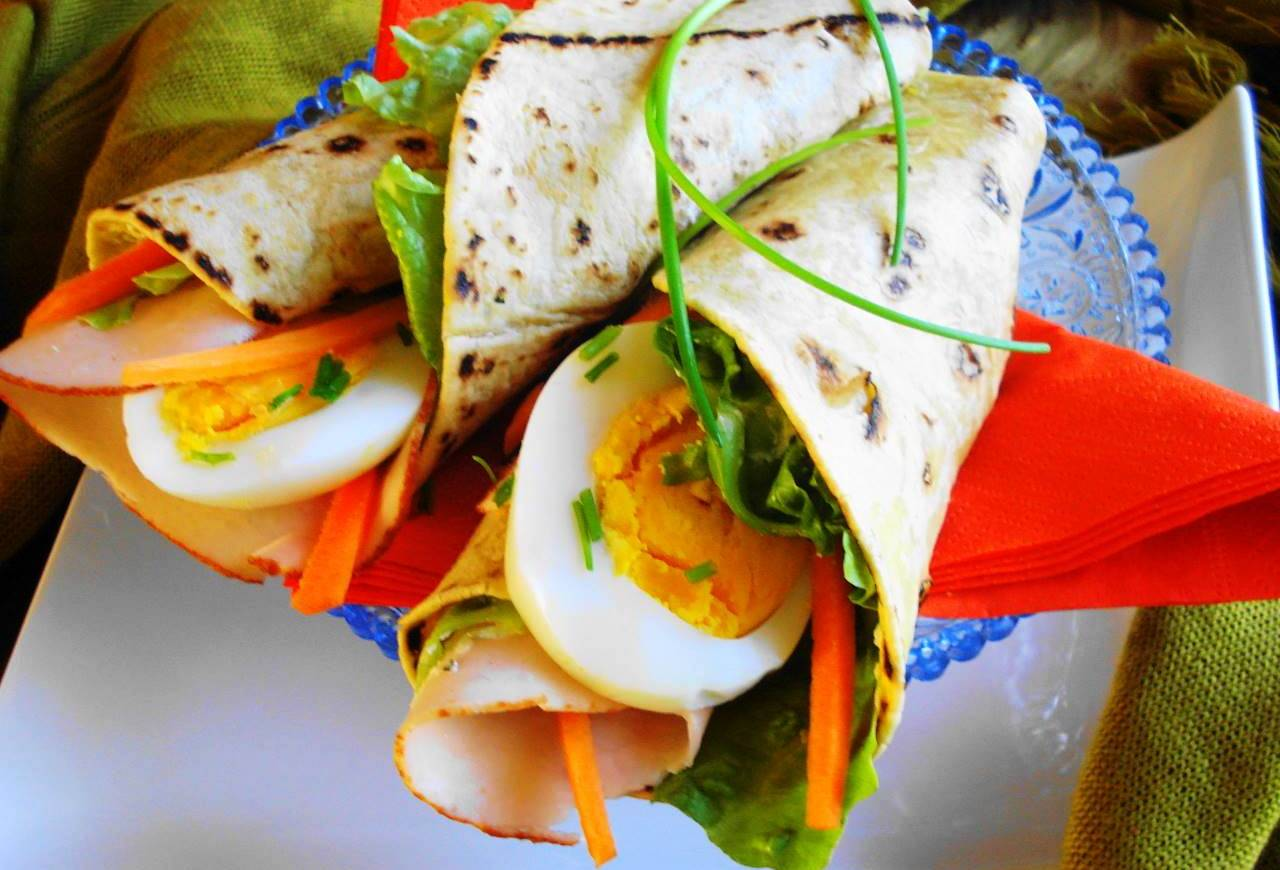 Deze Surinaamse roti is rijk gevuld met peulvruchten (peulvruchten zijn rijk aan vitamines en mineralen) en is ook vetarm.